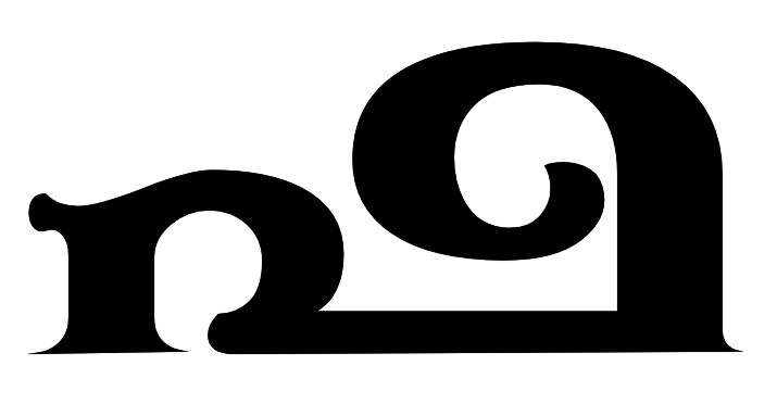 ഫഃ അക്ഷരം